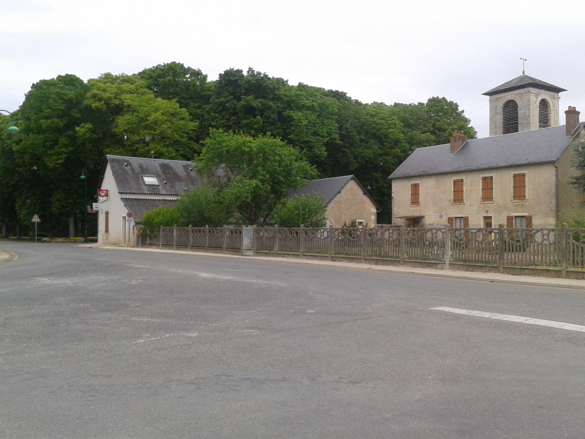 place principal d'Arçay 18